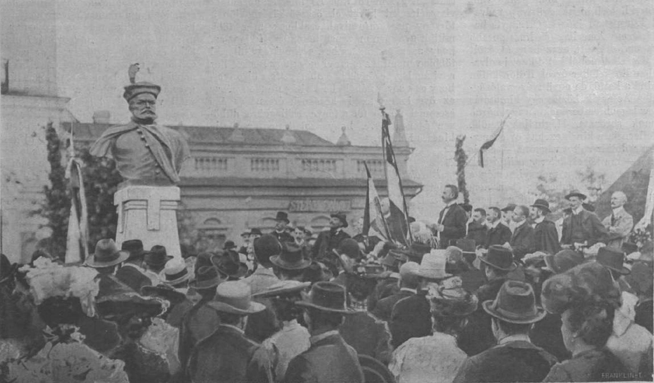 Bocskai István szobrának avatója, Nyárádszereda